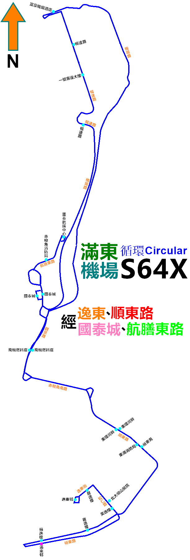 中文（香港）: 龍運巴士S64X線走線圖